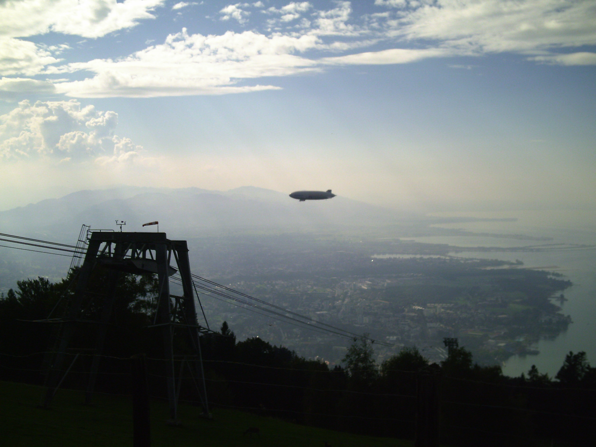 Der Pfänder, Hausberg von Bregenz in Vorarlberg (Österreich) mit Blick auf den Bodensee.